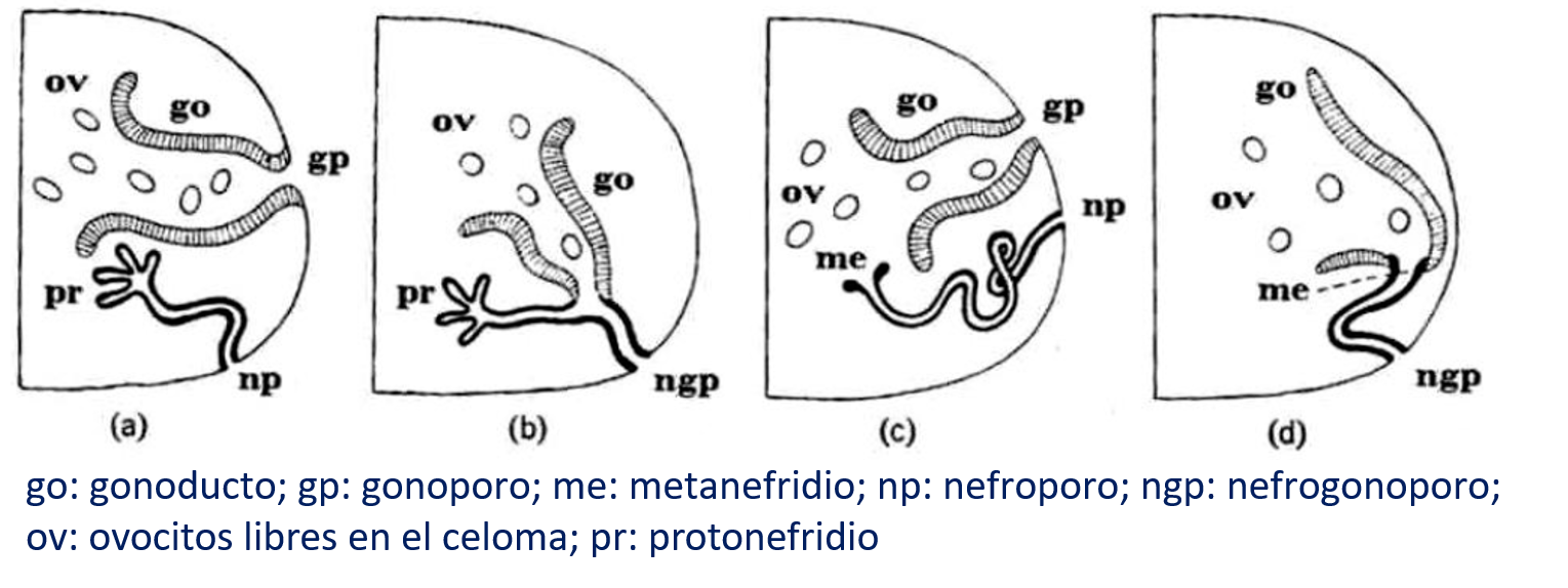 (a) Gonoducto separado del protonefridio; cada uno abre en un poro independiente (gonoporo y nefroporo); (b) fusión del embudo del gonoducto con el conducto del protonefridio; un solo poro permite la emisión de gametas y la salida de la orina; (c) Gonoducto separado del metanefridio; dos poros; (d) Fusión del embudo del gonoducto delante del embudo metanefridial.